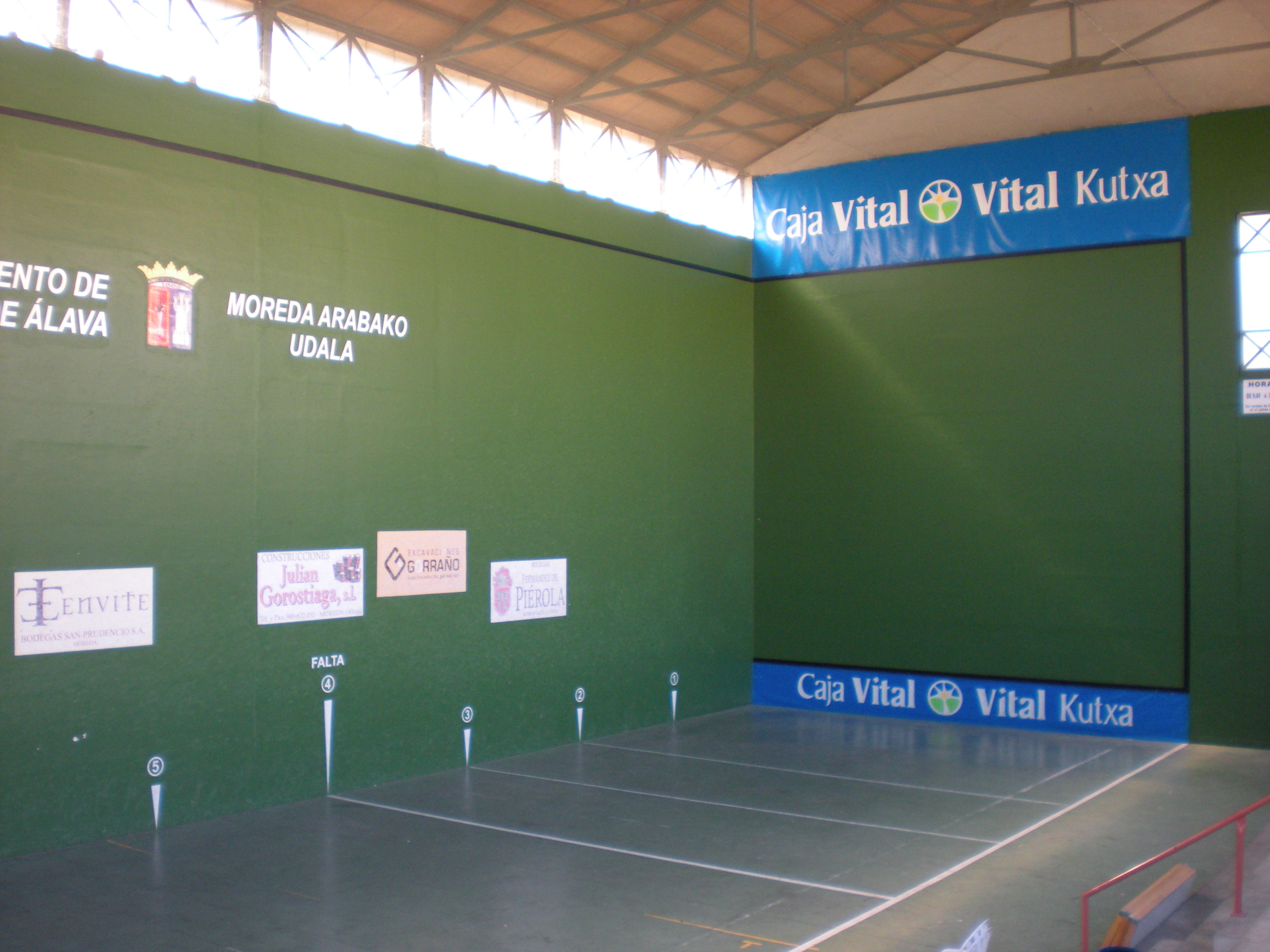 Moreda Arabako udal pilotalekuaren barrualdea